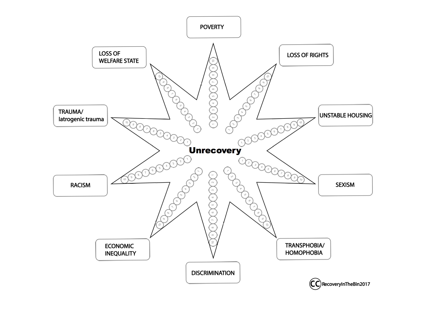 Estrella de la "anti-recuperación" diseñada por el colectivo Recovery in the Bin (Recuperación a la Basura) crítico con la interpretación y aplicación del modelo de recuperación en los servicios de atención a la salud mental.